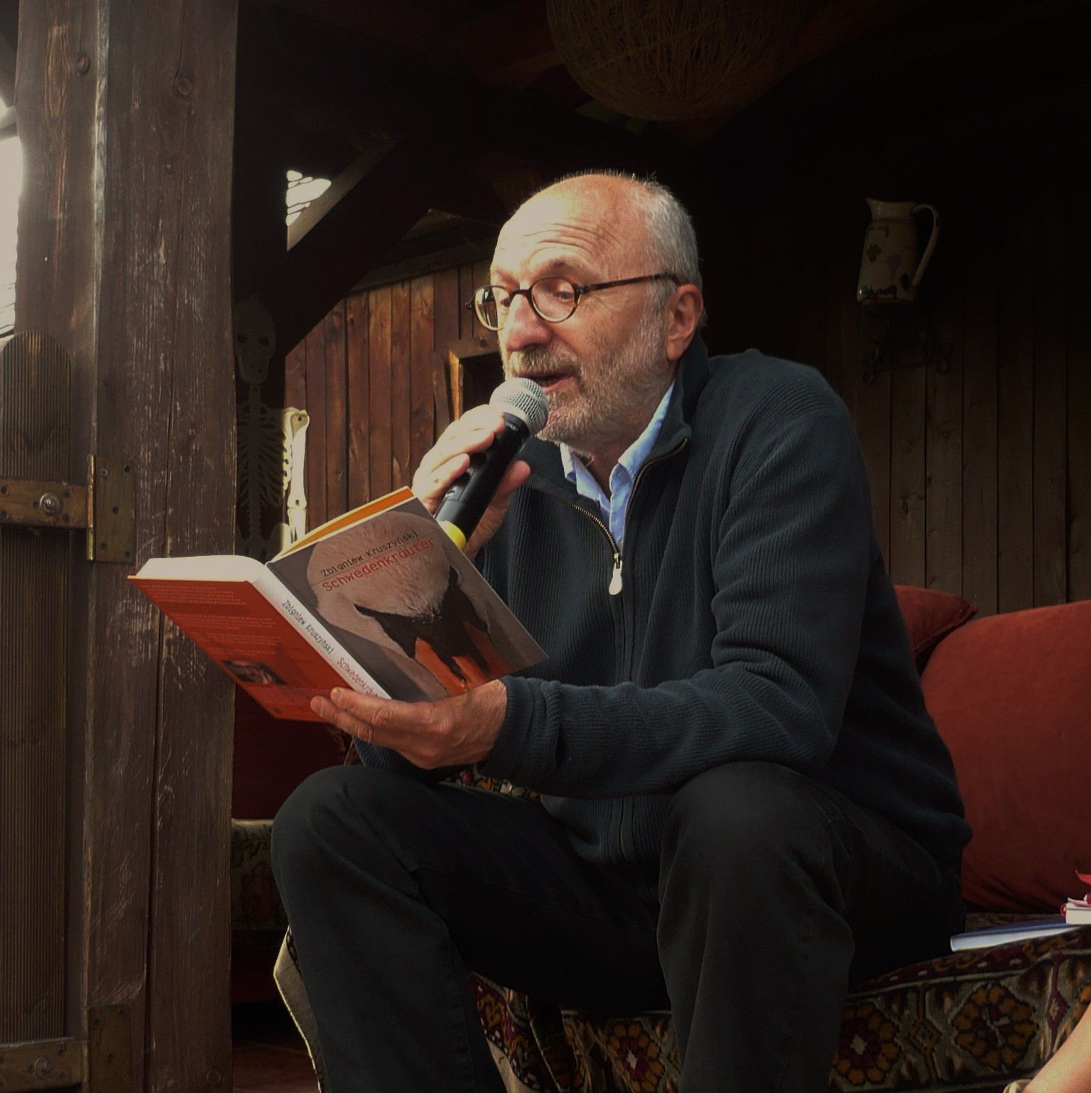 Pisarz Zbigniew Kruszyński na Festiwalu Góry Literatury w Krajanowie